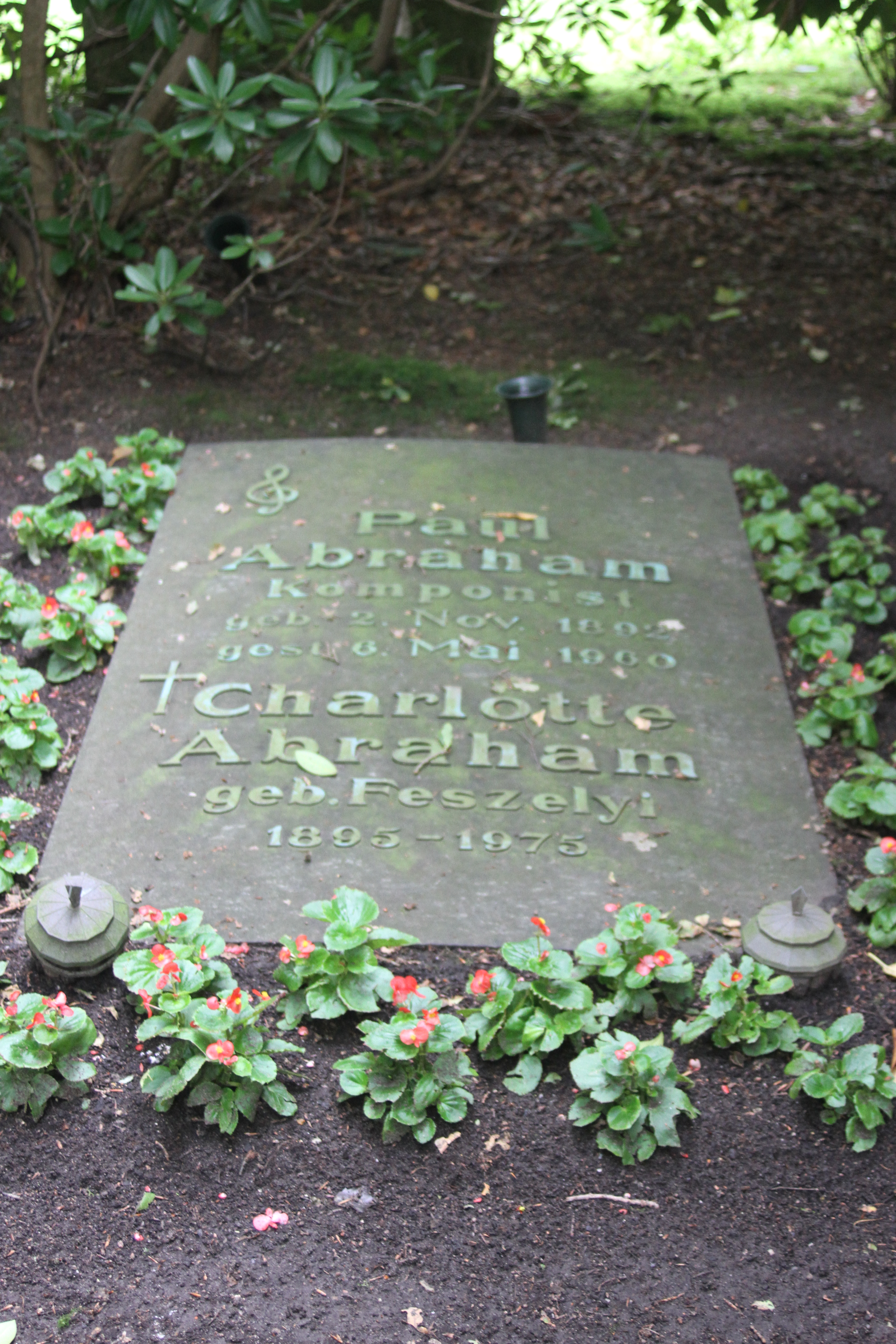 Paul Abraham, eigentlich Ábrahám Pál (* 2. November 1892 in Apatin, Königreich Ungarn, Österreich-Ungarn; † 6. Mai 1960 in Hamburg) war ein ungarisch-deutscher Komponist jüdischer Abstammung. Er schrieb vornehmlich Operetten.